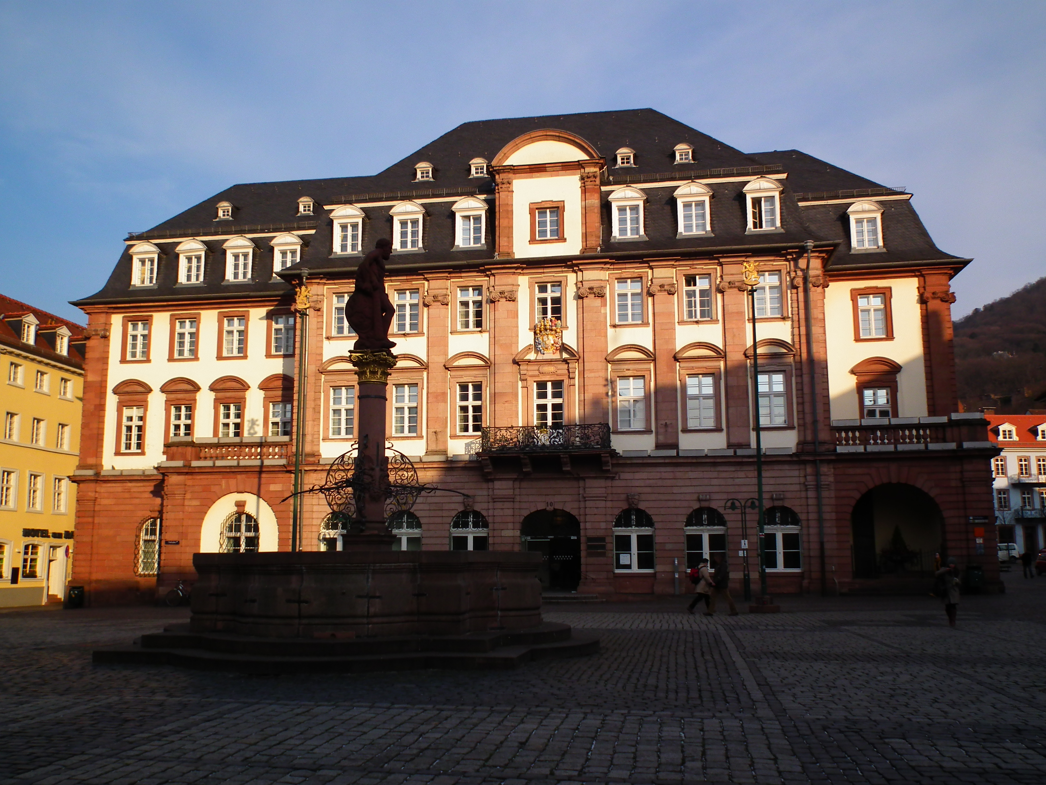 Herkulesbrunnen und Rathaus am Marktplatz in der Heidelberger Altstadt (Baden-Württemberg, Deutschland)